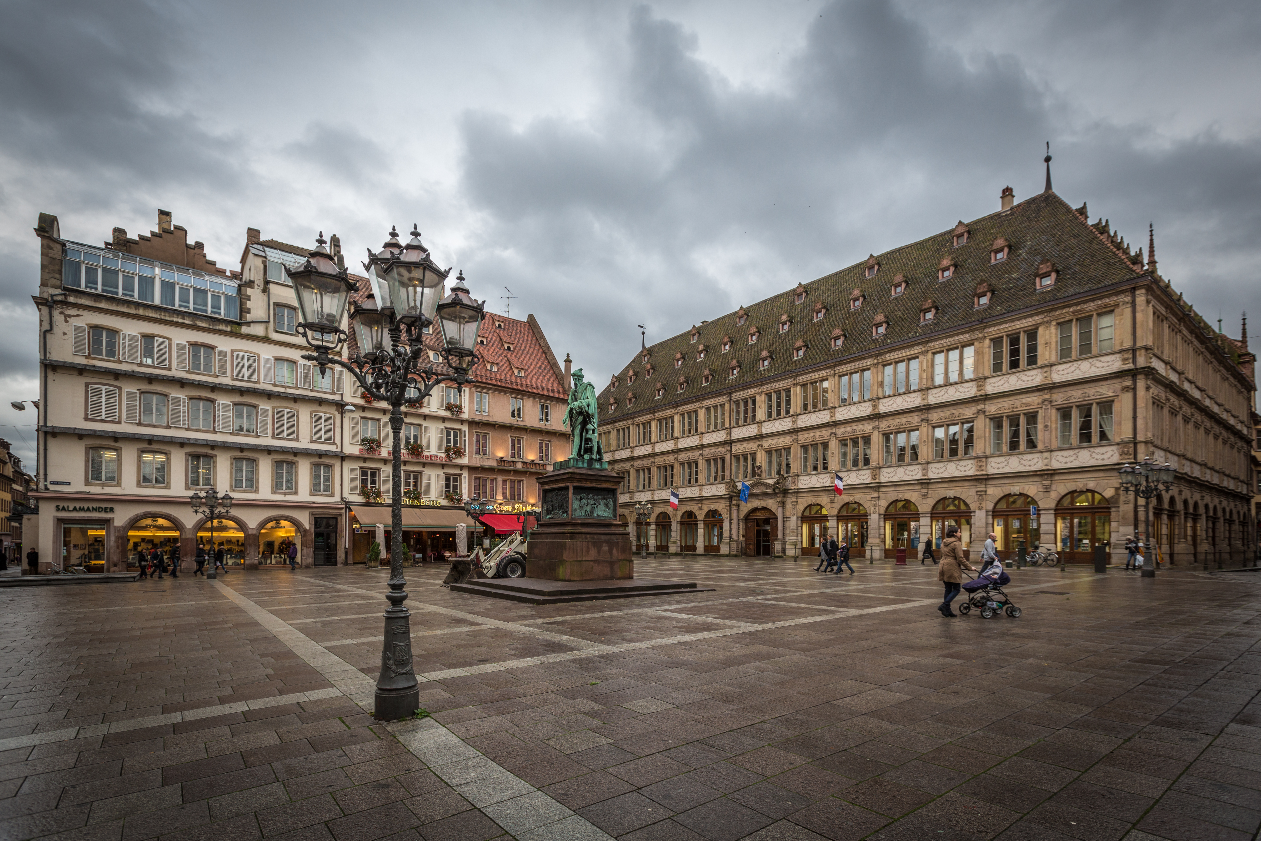 Strasbourg place Gutenberg novembre 2013.